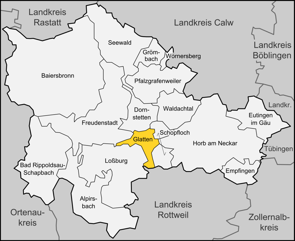 Karte der Gemeinde Glatten im Landkreises Freudenstadt